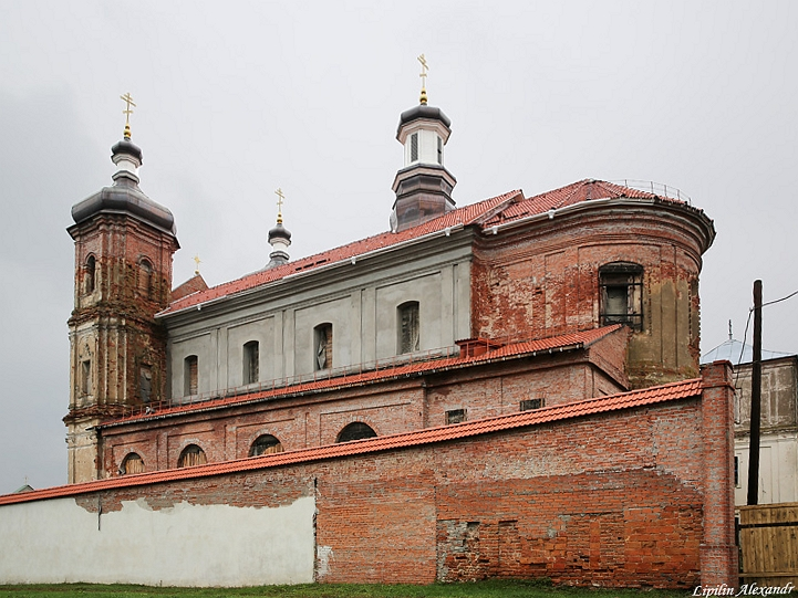 Юравіцкі кляштар езуітаў